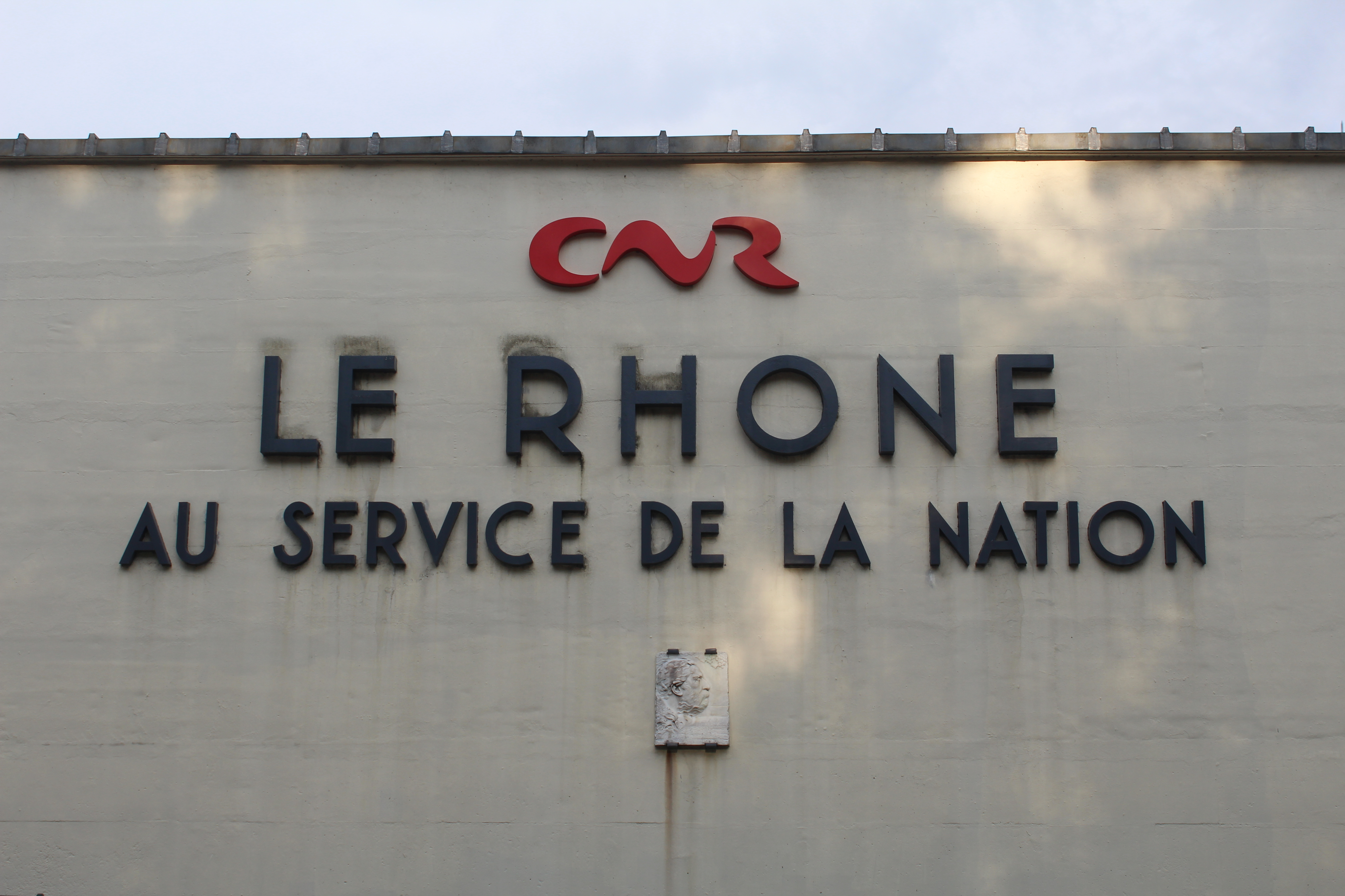 Barrage de Seyssel, Haute-Savoie.